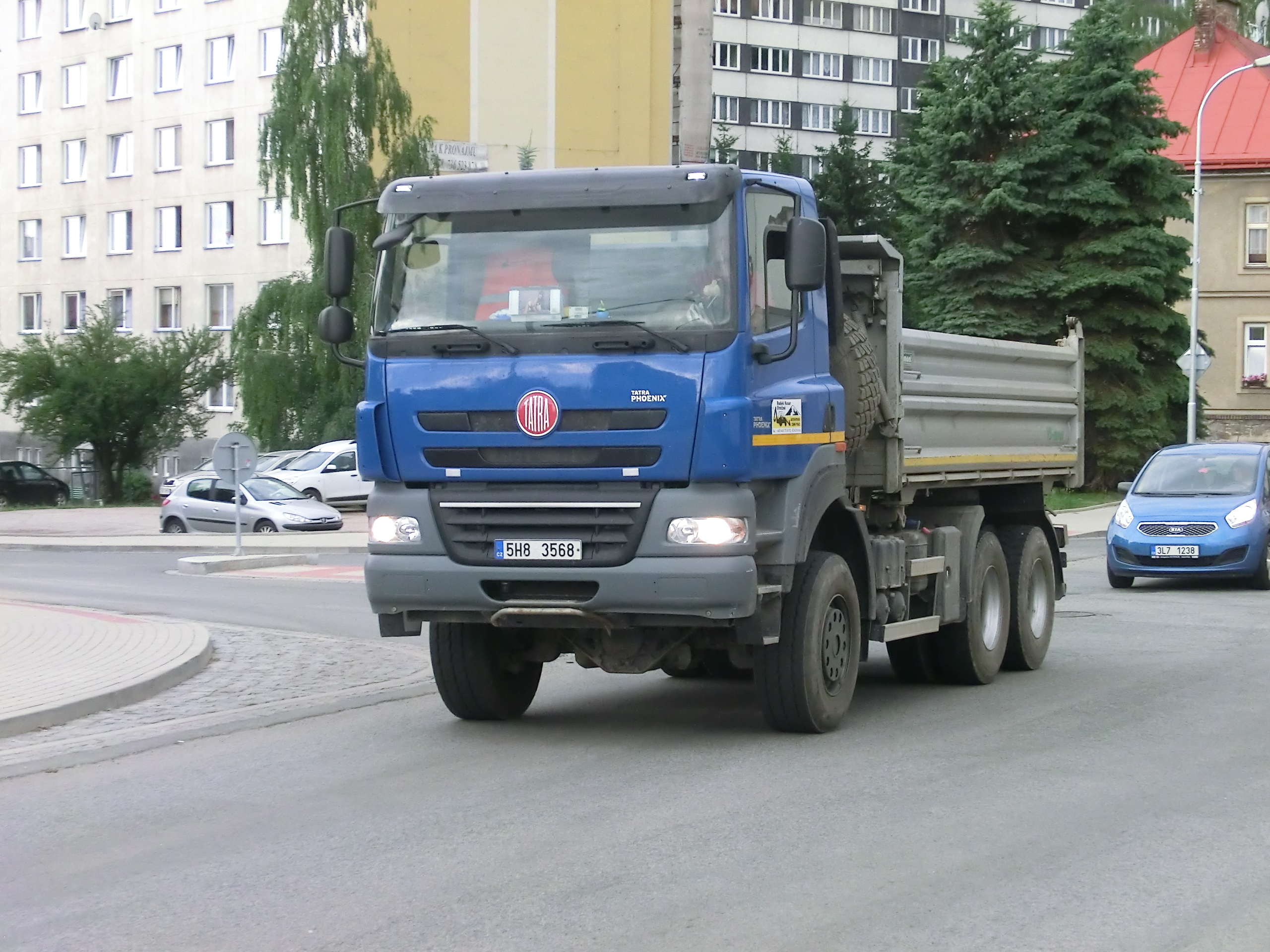 Tatra 158 sklápěč projíždí Vrchlabím.